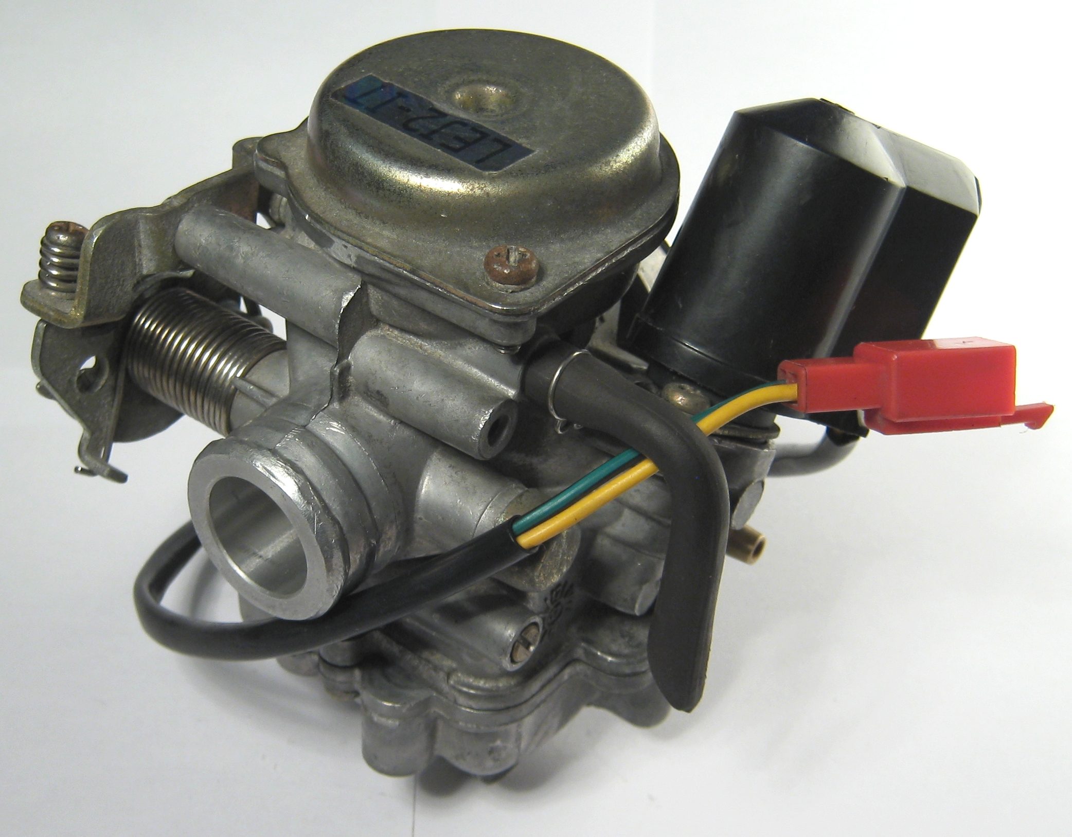 CVK karburator fra en Kymco Super 8 scooter.